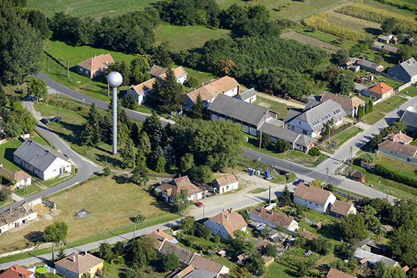 Mihályháza